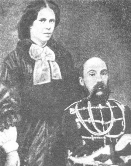 Андрей Афанасьевич Красовский (1822—1868) — военный, общественный деятель, революционер